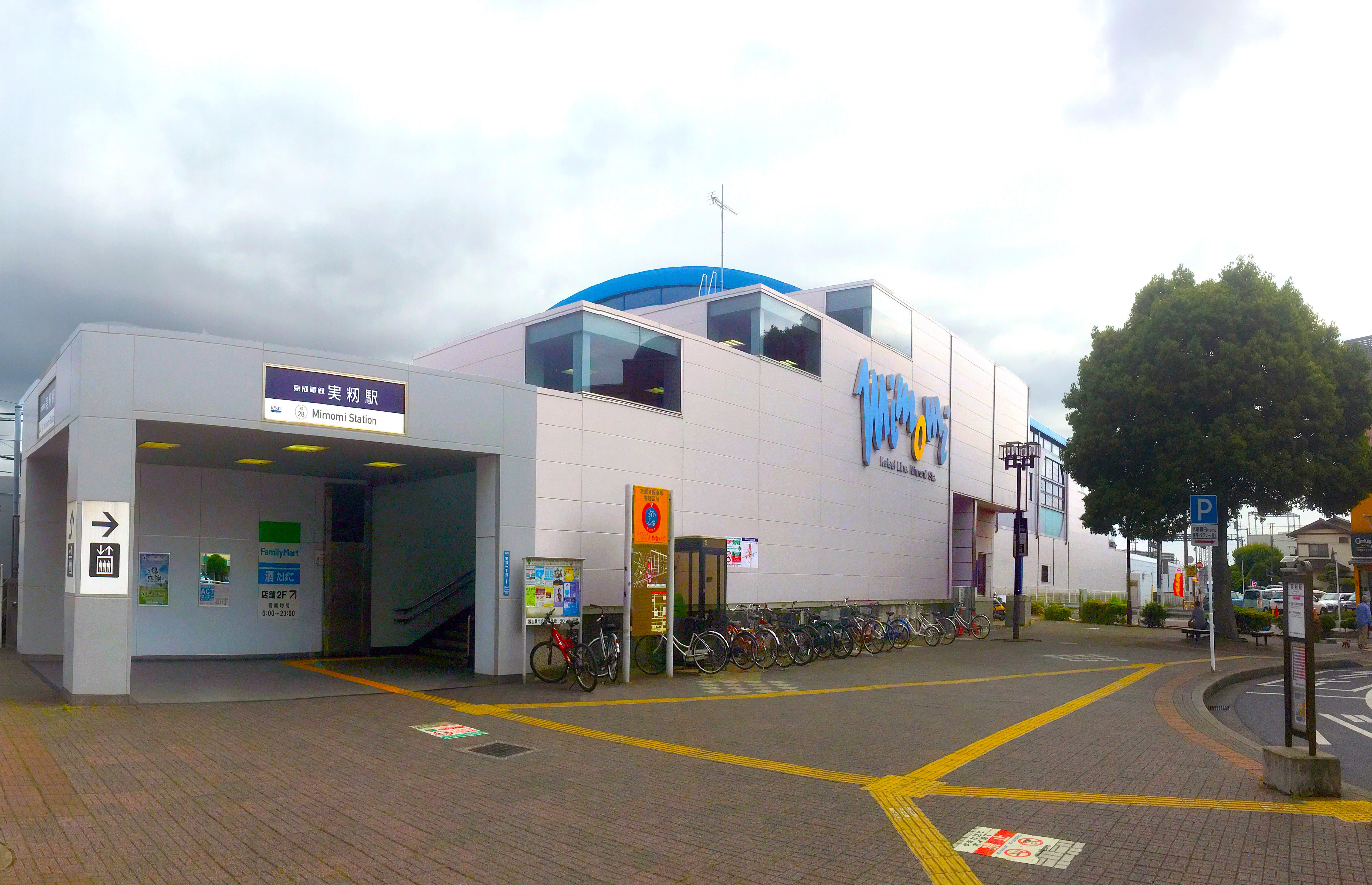 実籾駅 (Mimomi Station)